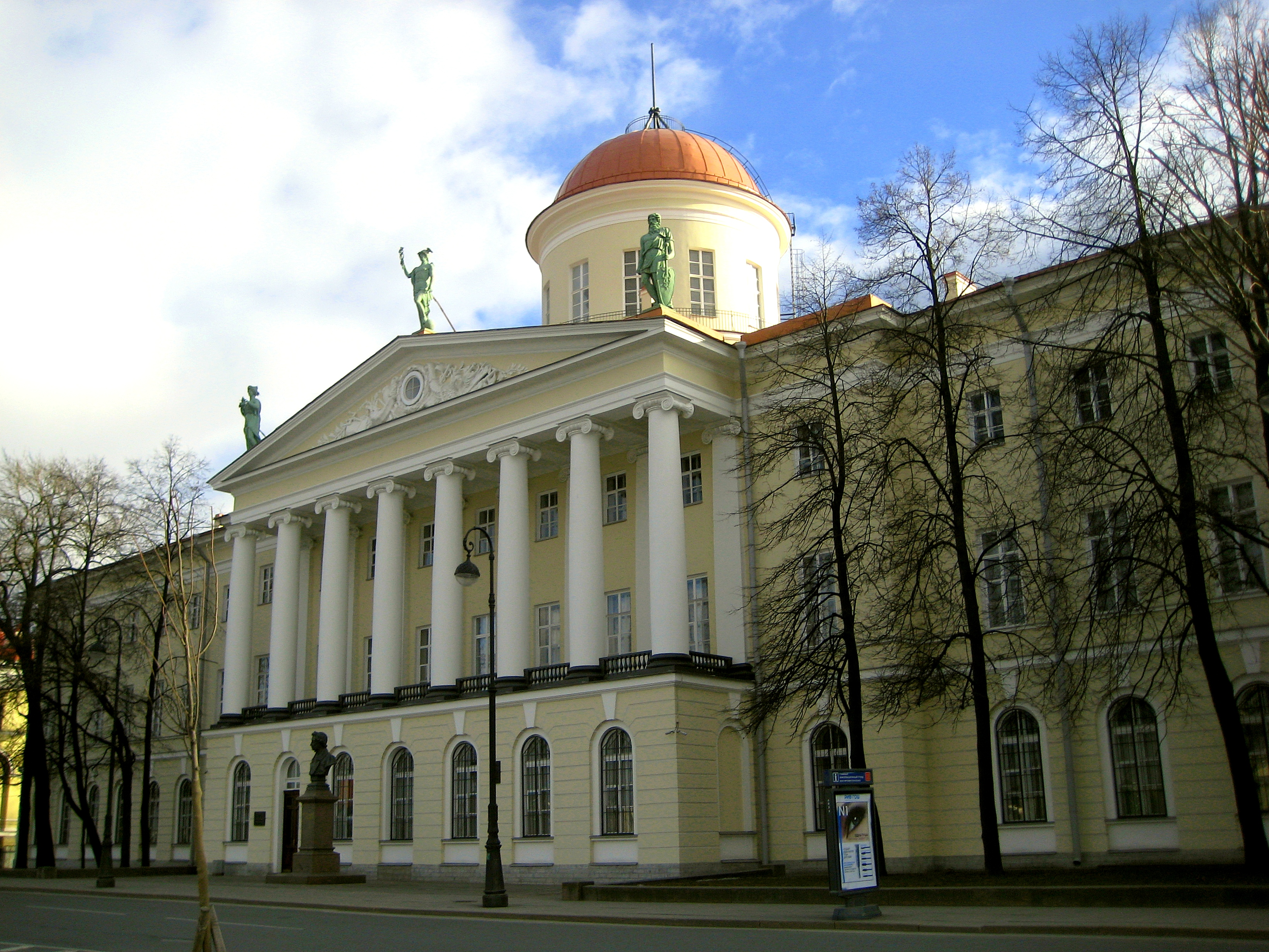 Санкт-Петербург. Макарова набережная, 4. Здание бывшей таможни (Пушкинский дом). Архитектор - Лукини И.Ф.